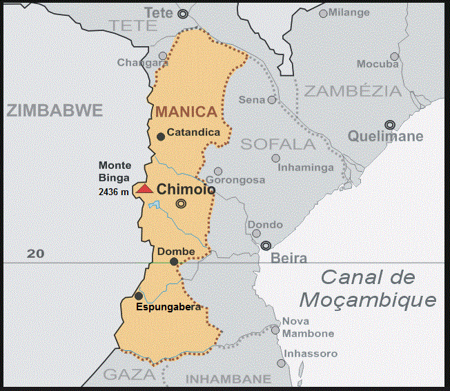 Mapa da provÃ­ncia de Manica (provÃ­ncia), em MoÃ§ambique